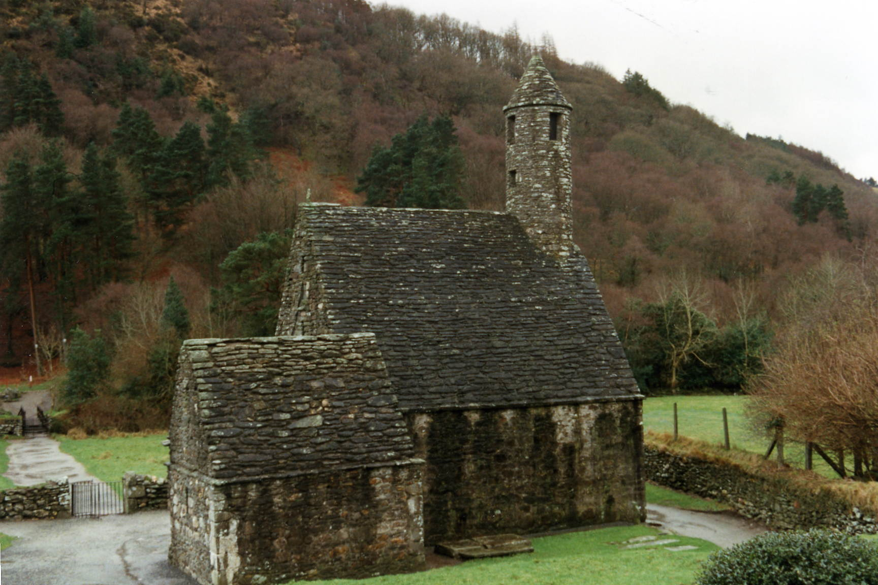 Chapelle Saint Kevin située sur le site de Glendalough